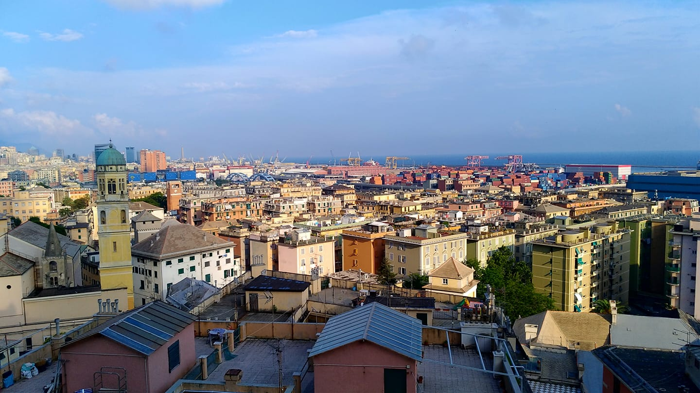 Cornigliano, dalla collona di via Col di Lana.